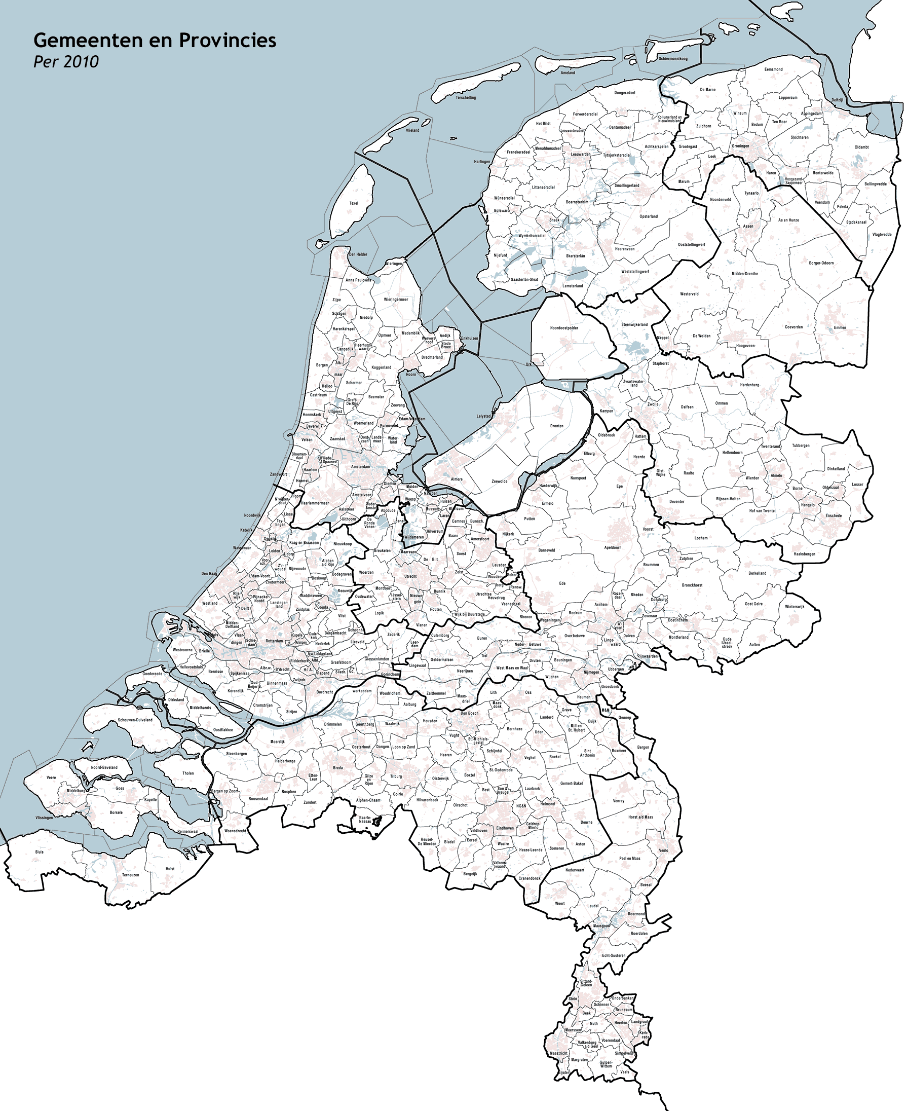 Nederlandse Gemeenten per 18 maart 2010, samenstelling op basis van vrij beschikbare geodata van het Centraal Bureau voor de Statistiek CBS